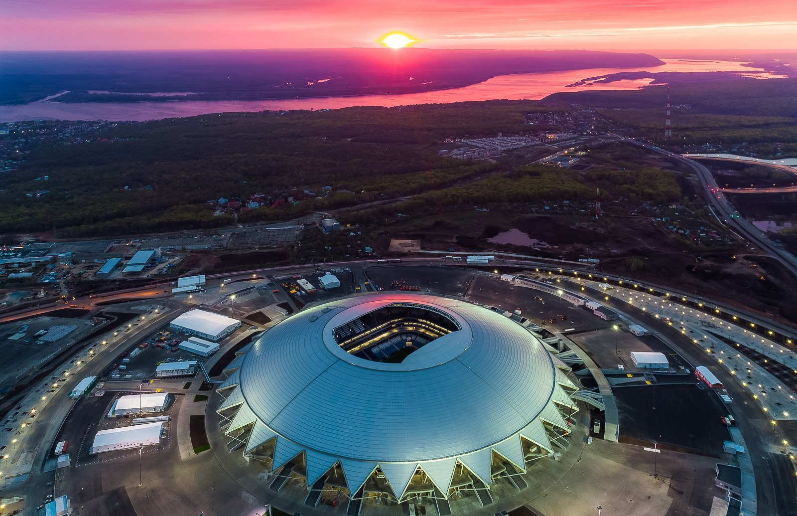 Самара арена на закате